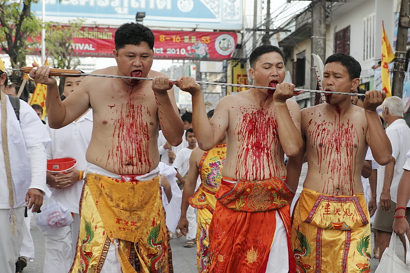 vegetarian festival phuket